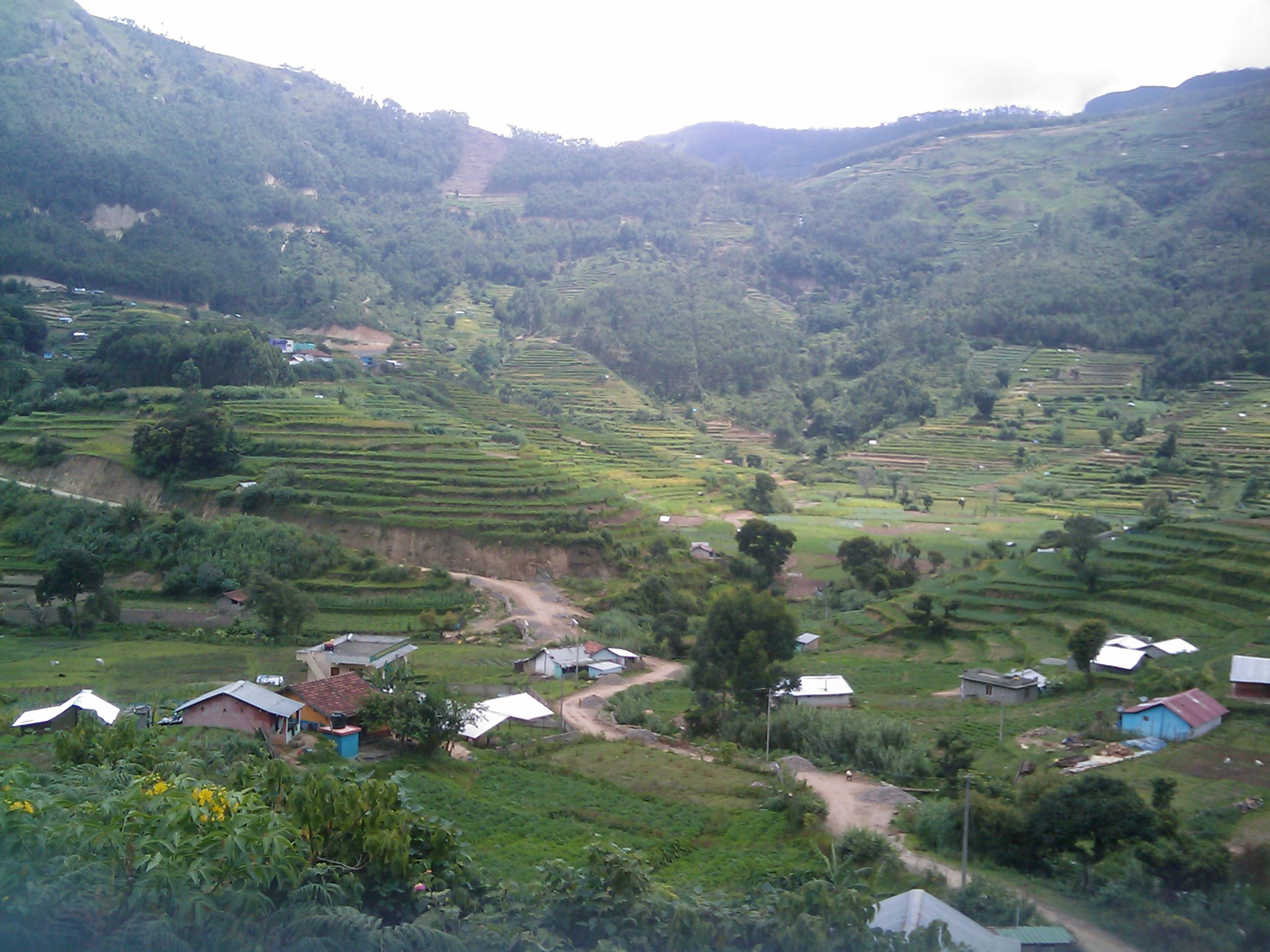 കോവിലൂർ ടൌണ്‍ അടുത്തുള്ള ഗ്രാമം